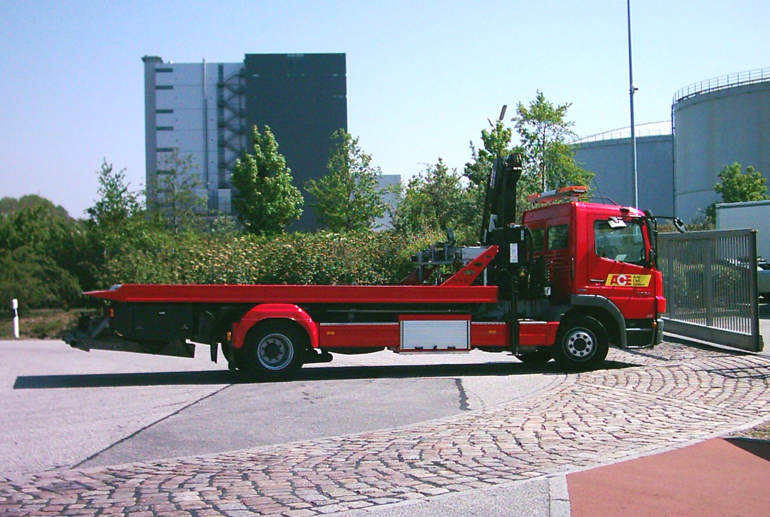 Fejeblad fra rugseringsfirmaet Auto Club Europa